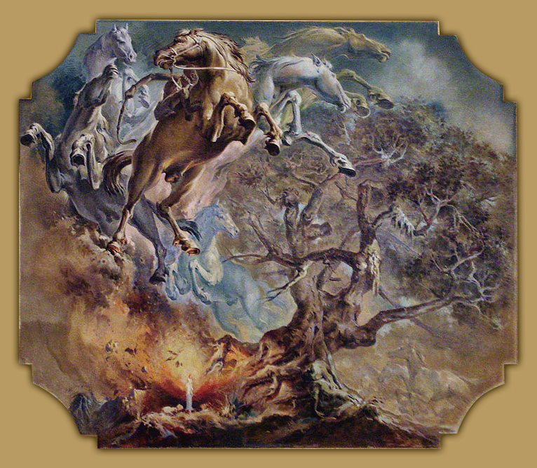 painel do Negrinho do Pastoreio, Palácio Piratini